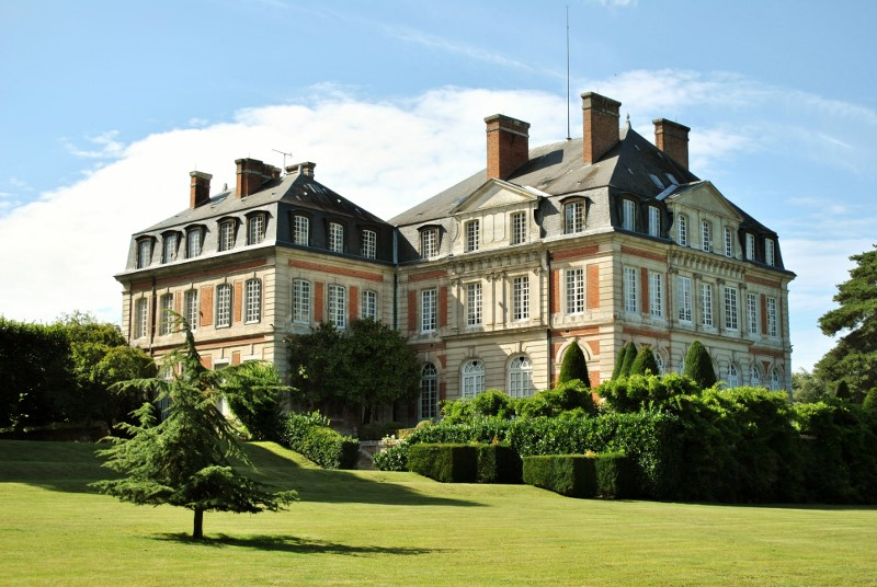 Château de Fontaine-la-Soret - Le parc est un site classé (27 198 000 - 1998). Le château et son parc bénéficient en outre du label « Patrimoine du XXe siècle ».